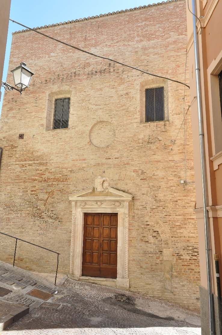 Penne (comune, Italy) 2012